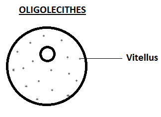 ceci est un schéma d'un type d'oeuf.